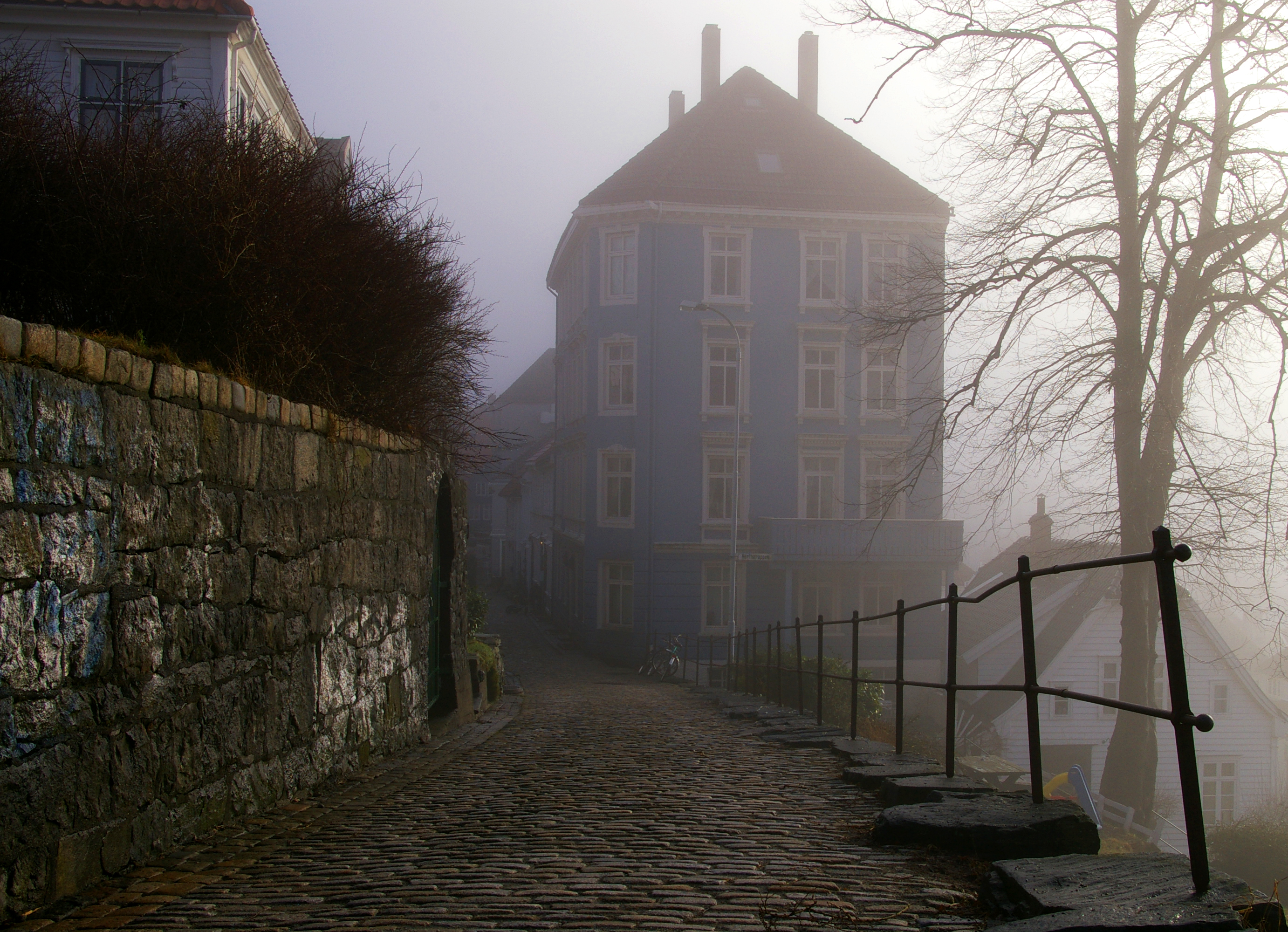 Fog in Bergen, Norway. Galgebakken at Nordnes.